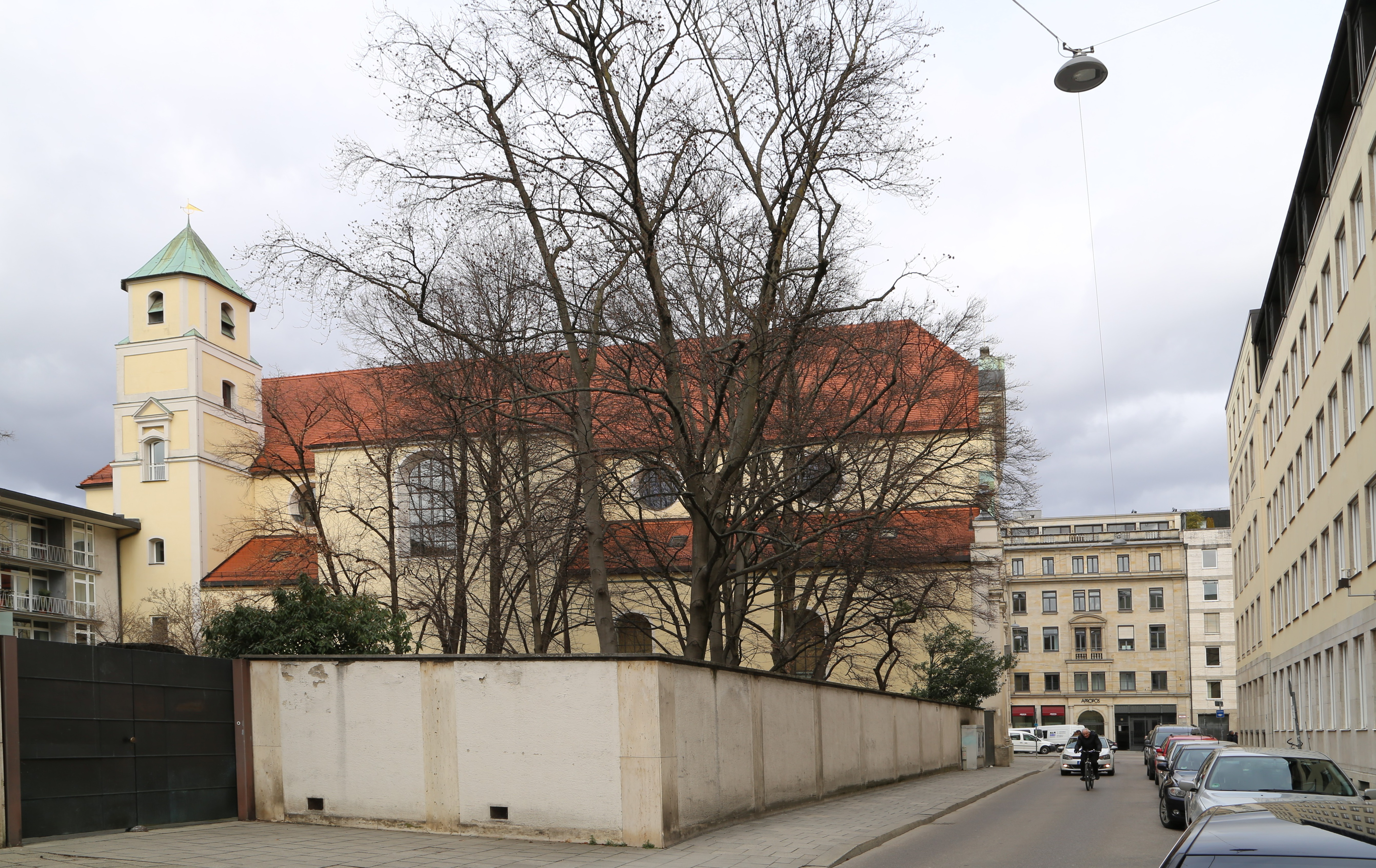 Karmeliterstraße, links Nr. 1 die Karmeliterkirche, München